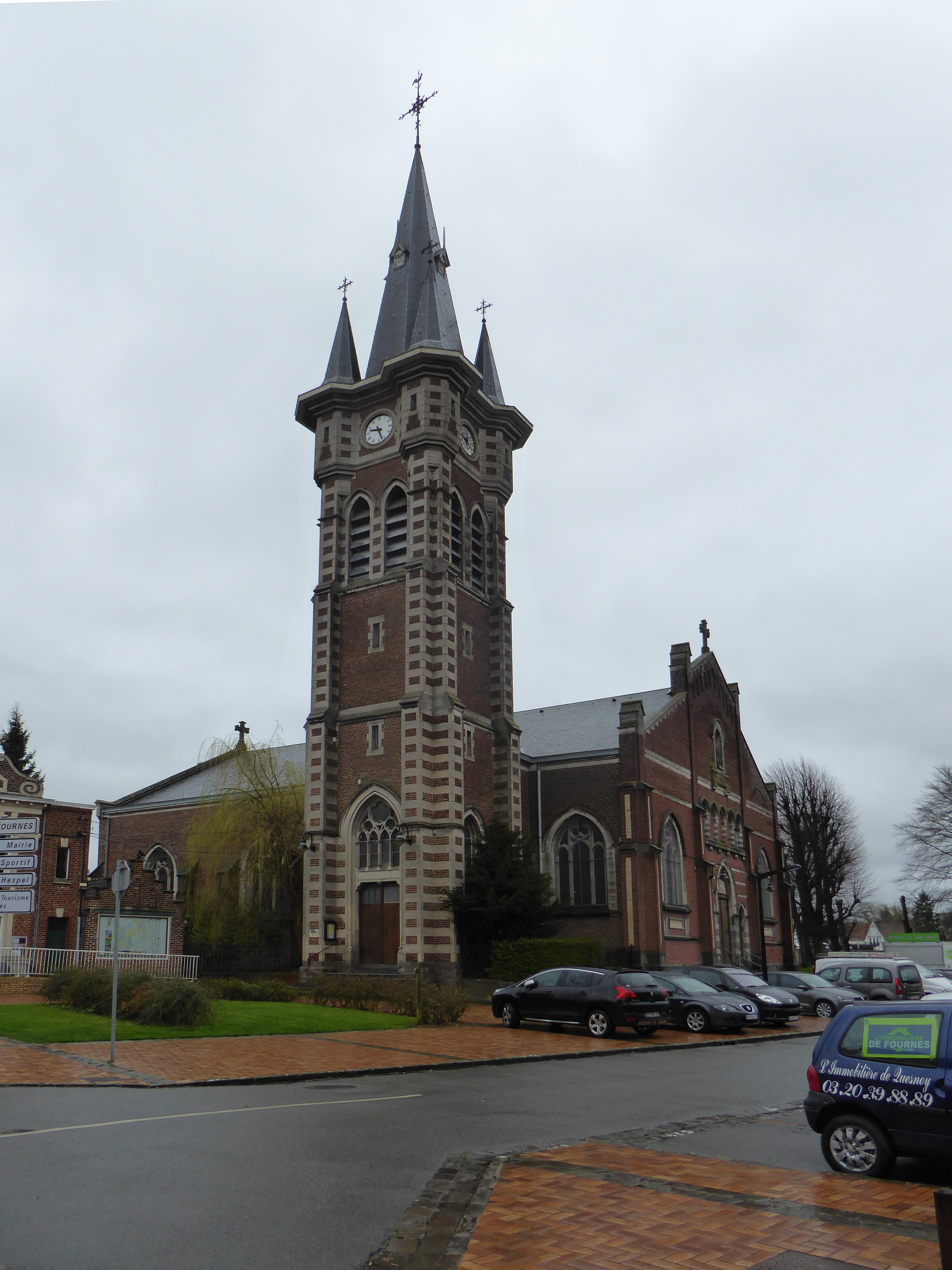 L'église de La-Nativité-de-Notre-Dame Fournes-en-Weppes, France